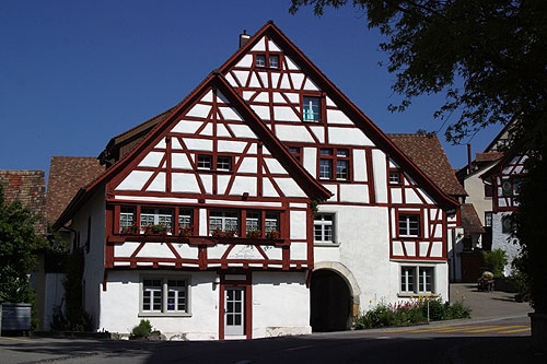 Riegelbau in Thayngen (Nr. 03.1-5299)